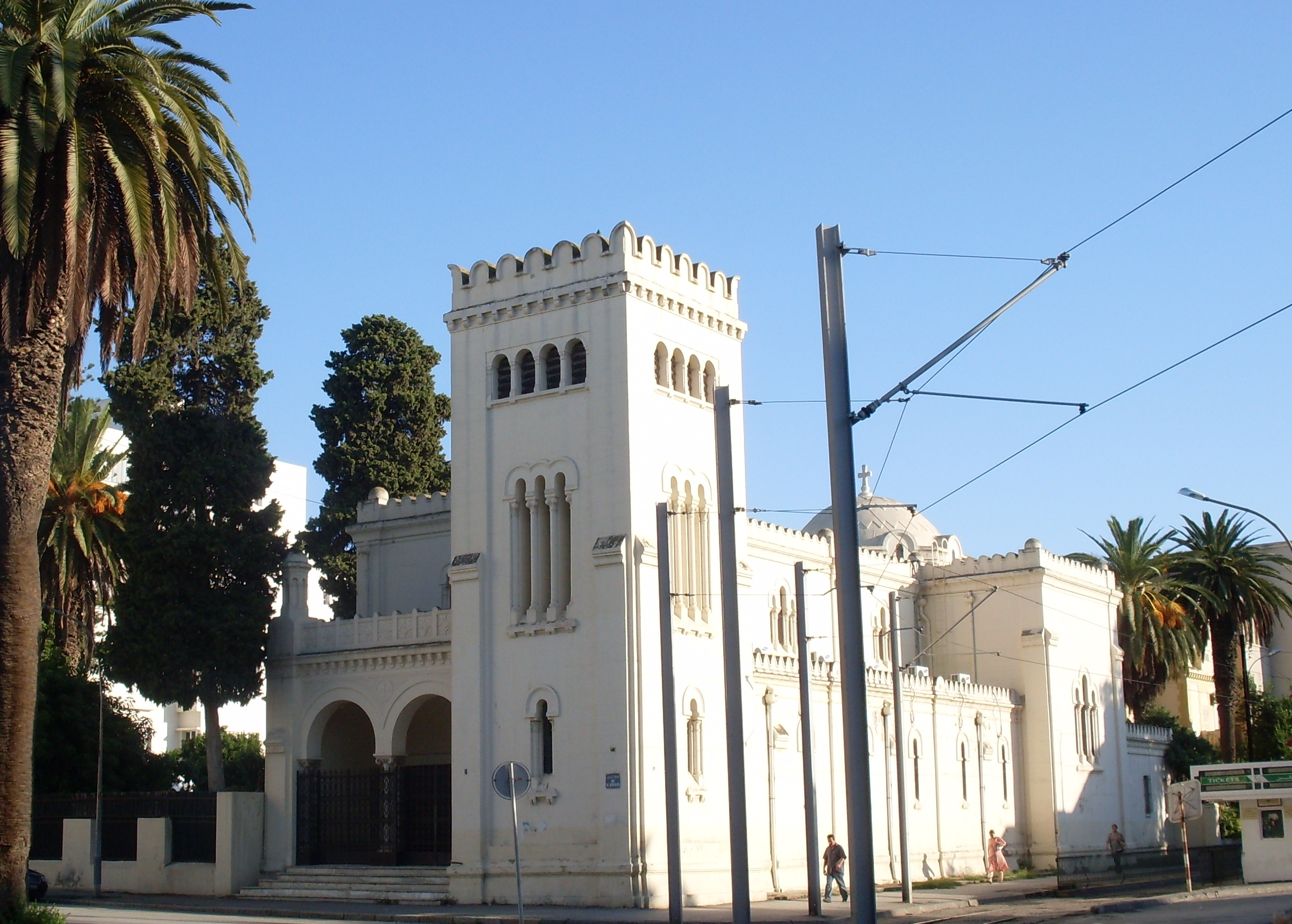 Culte catholique, Eglise Sainte Jeanne d'Arc, place de Palestine